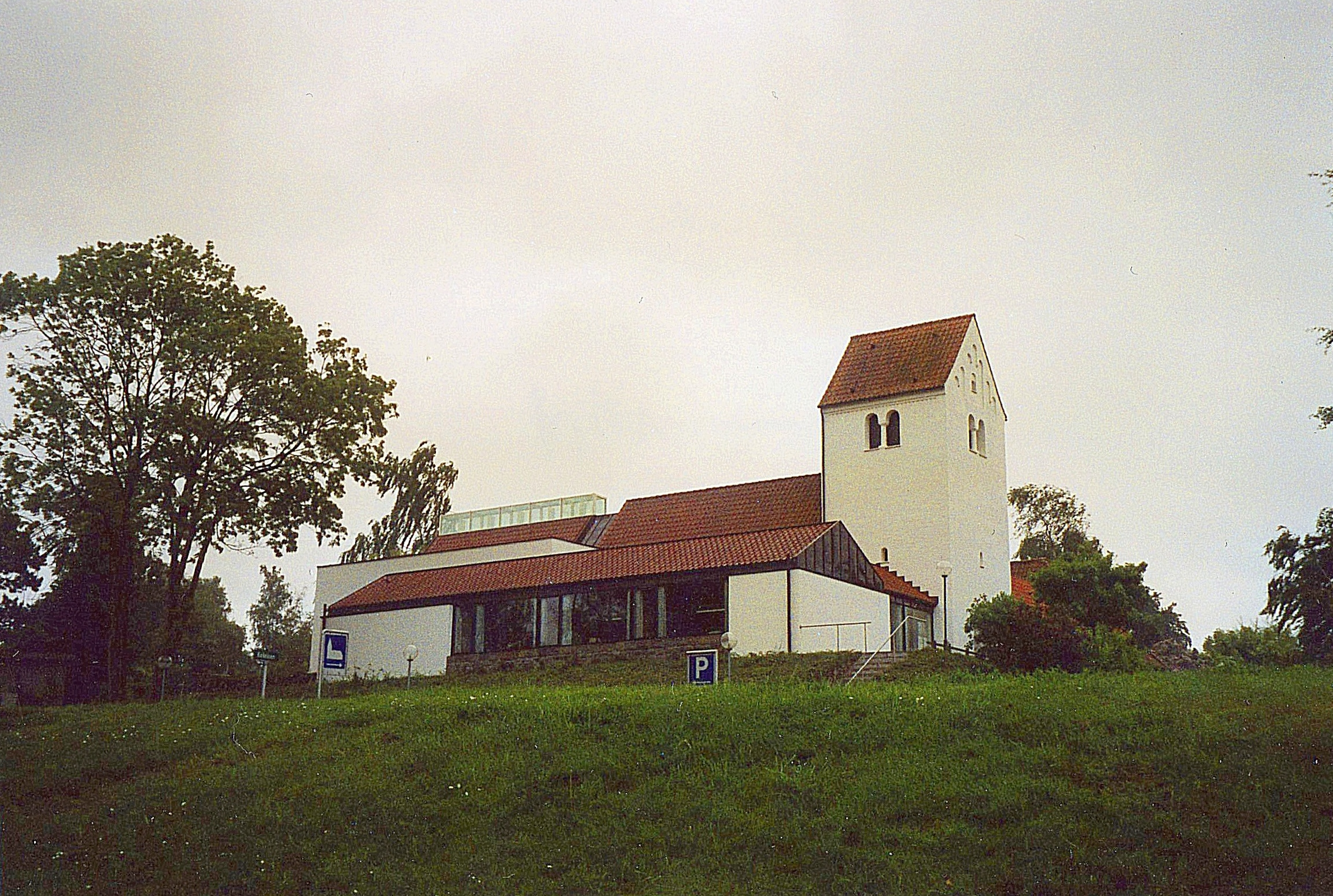 Nærum Kirke, Nærum Sogn, Rudersdal Kommune